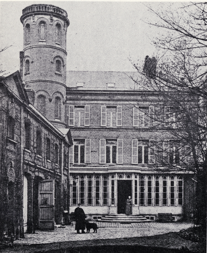 La Maison du 2 rue Charles Dubois à Amiens (Somme) où Jules Verne à vécu de 1882 à 1900. Vue extérieure depuis la cour avec Honorine et Jules Verne accompagnés de leur chienne Follette.